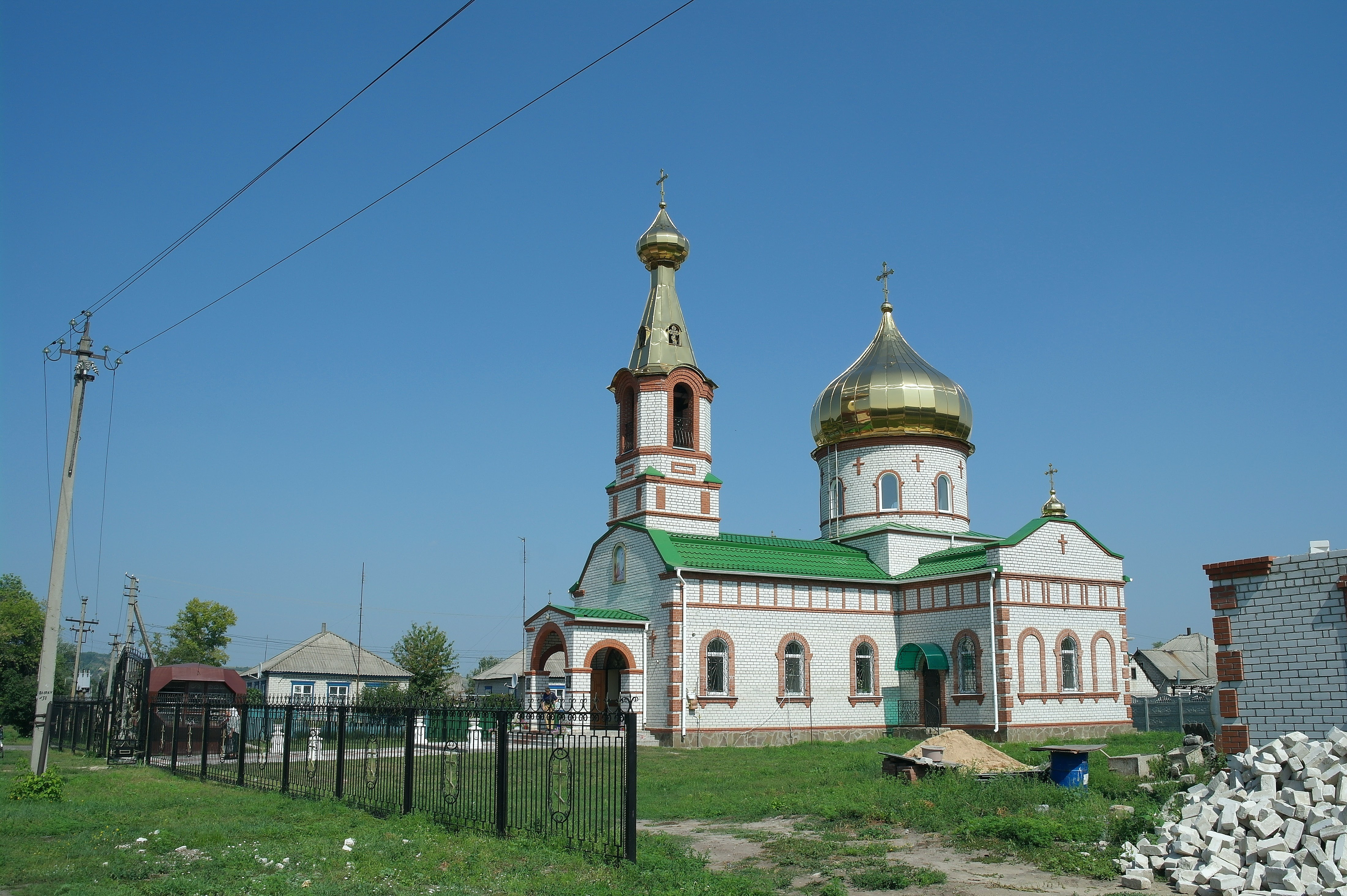 Красноріченське (до 1973 року — Кабаннє]), Луганська область